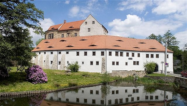 Das Schloss Klippenstein befindet sich in Radeberg bei Dresden.